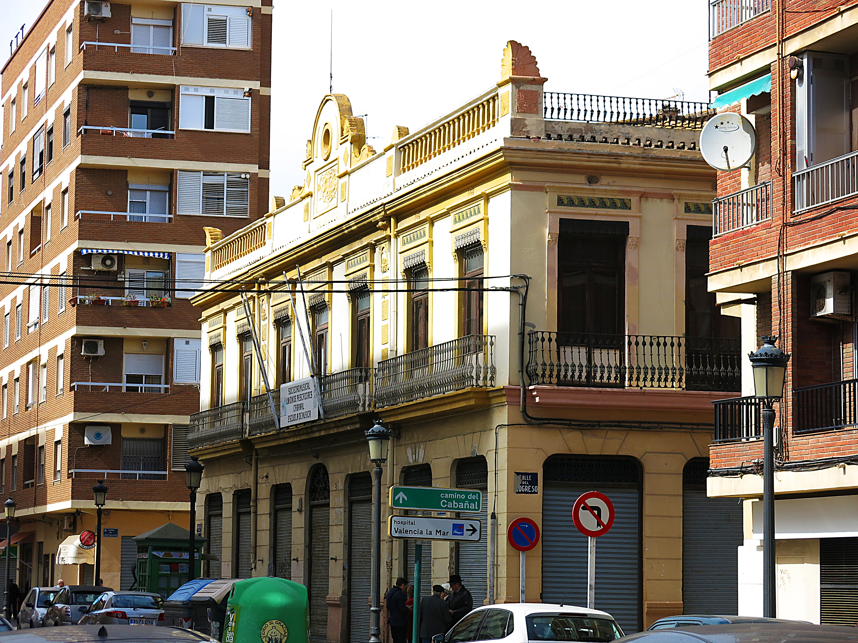 El Casinet del Cabanyal, c. Pintor Ferrandis - c. Progrés (València)